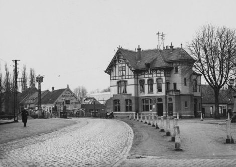 Postkantoor aan de markt, gezien vanaf de hoofdstraat, omstreeks 1932